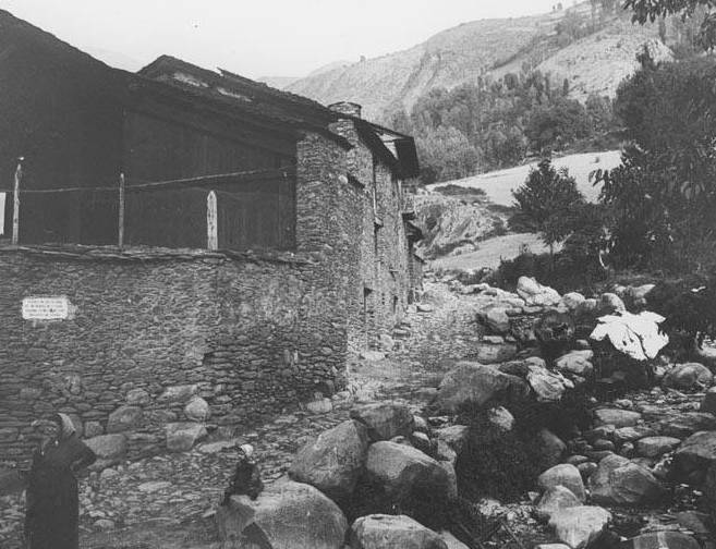 Imatge